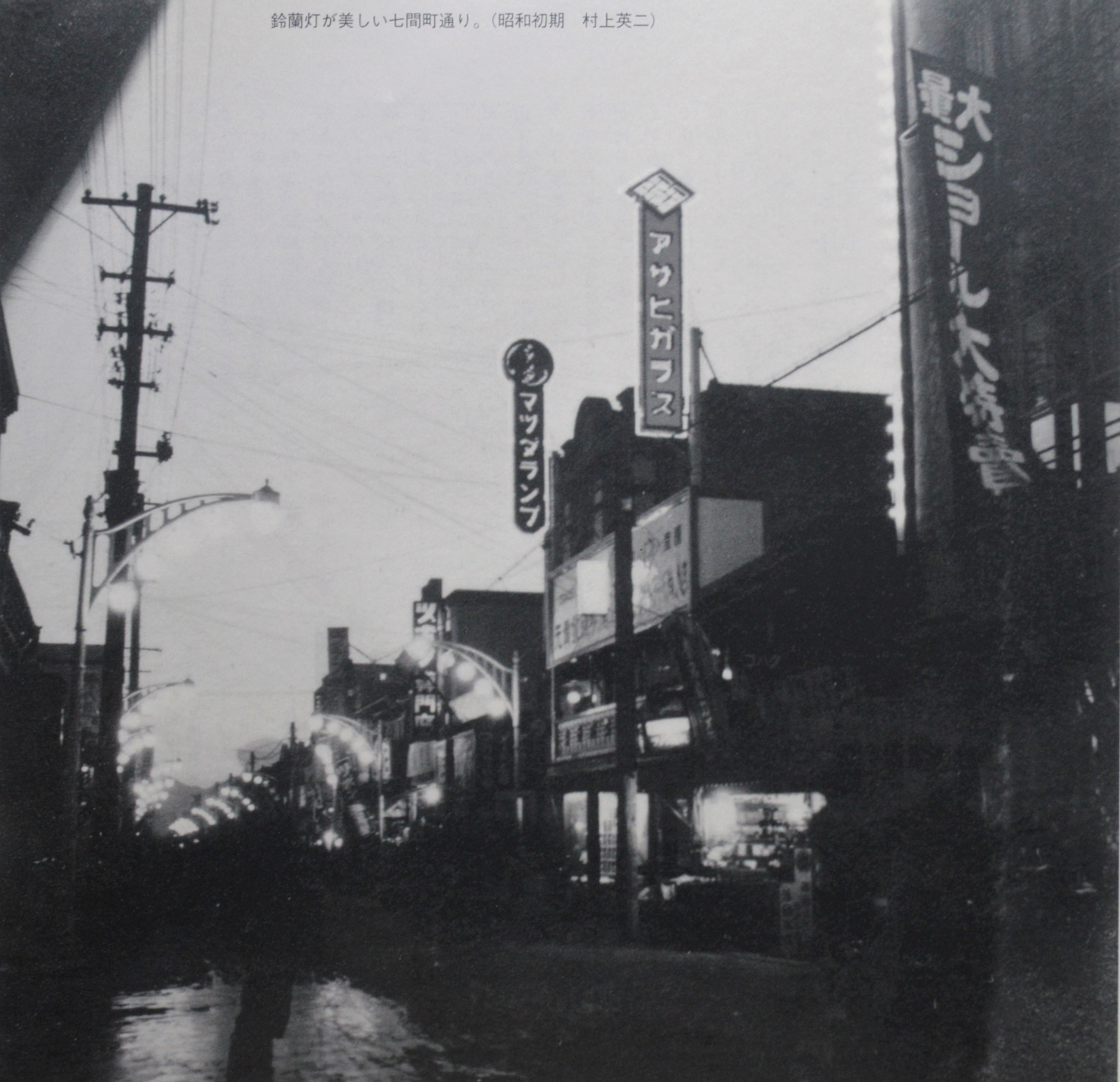 昭和初期の静岡市七間町。1928年に街路灯が設置された。